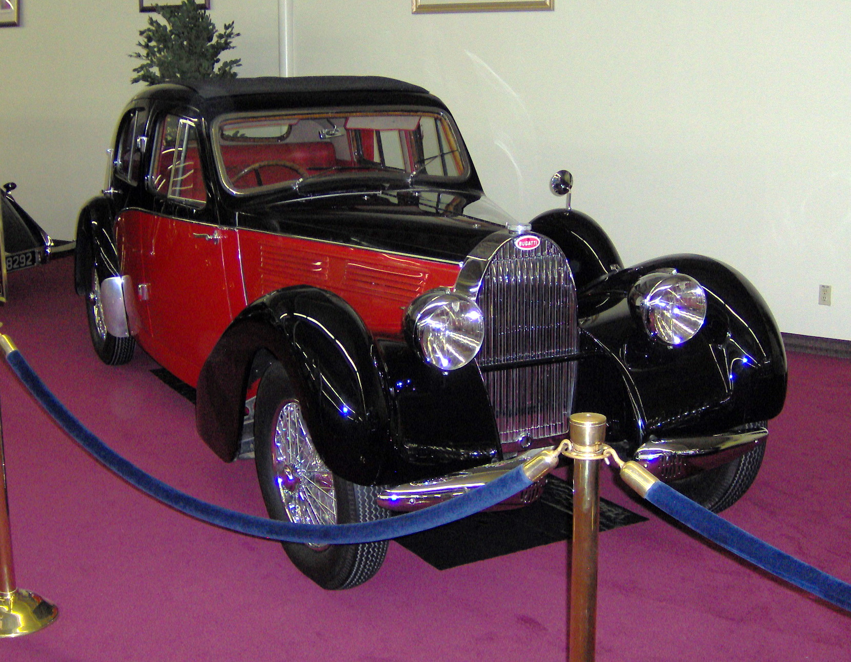 1939 Bugatti Type 57C Galibier Saloon